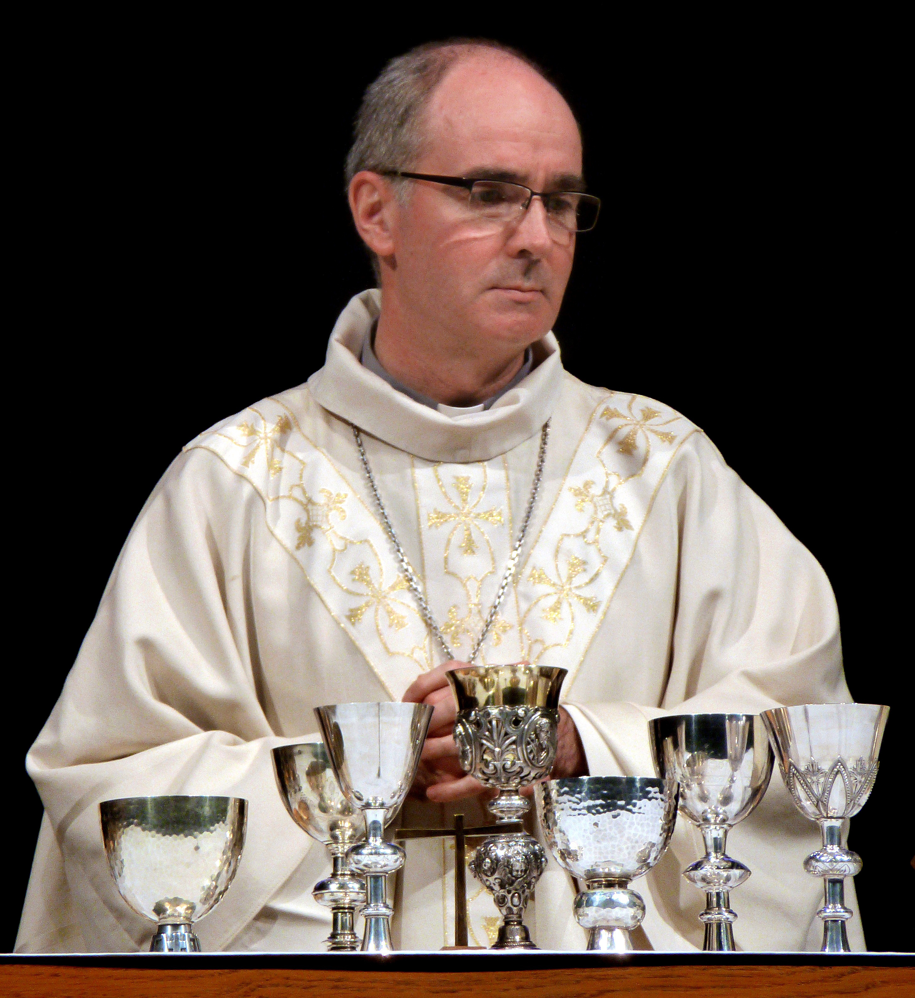 Mgr Laurent Percerou, évêque de Moulins, lors du rassemblement Ecclesia Campus 2015 à Grenoble.